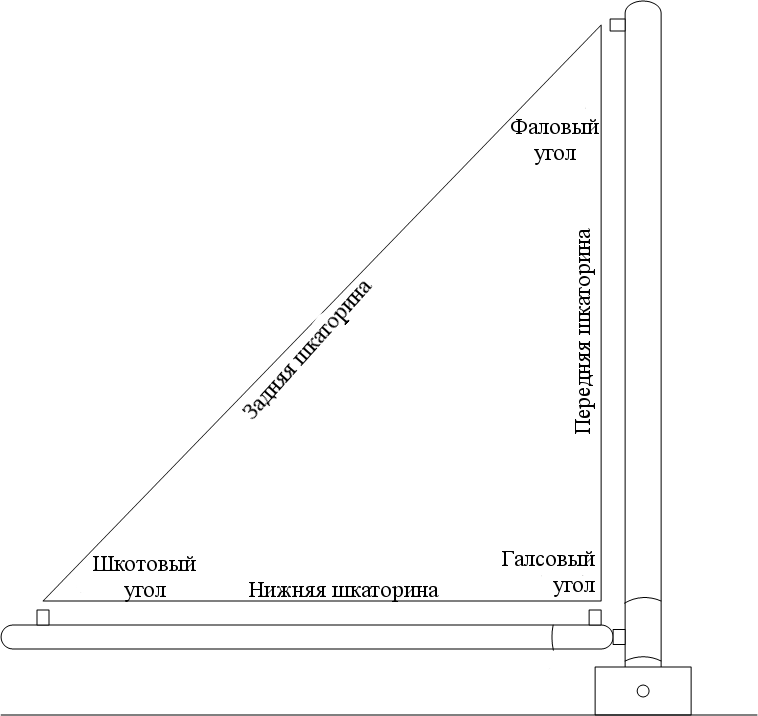 Переведённая версия изображения [1]